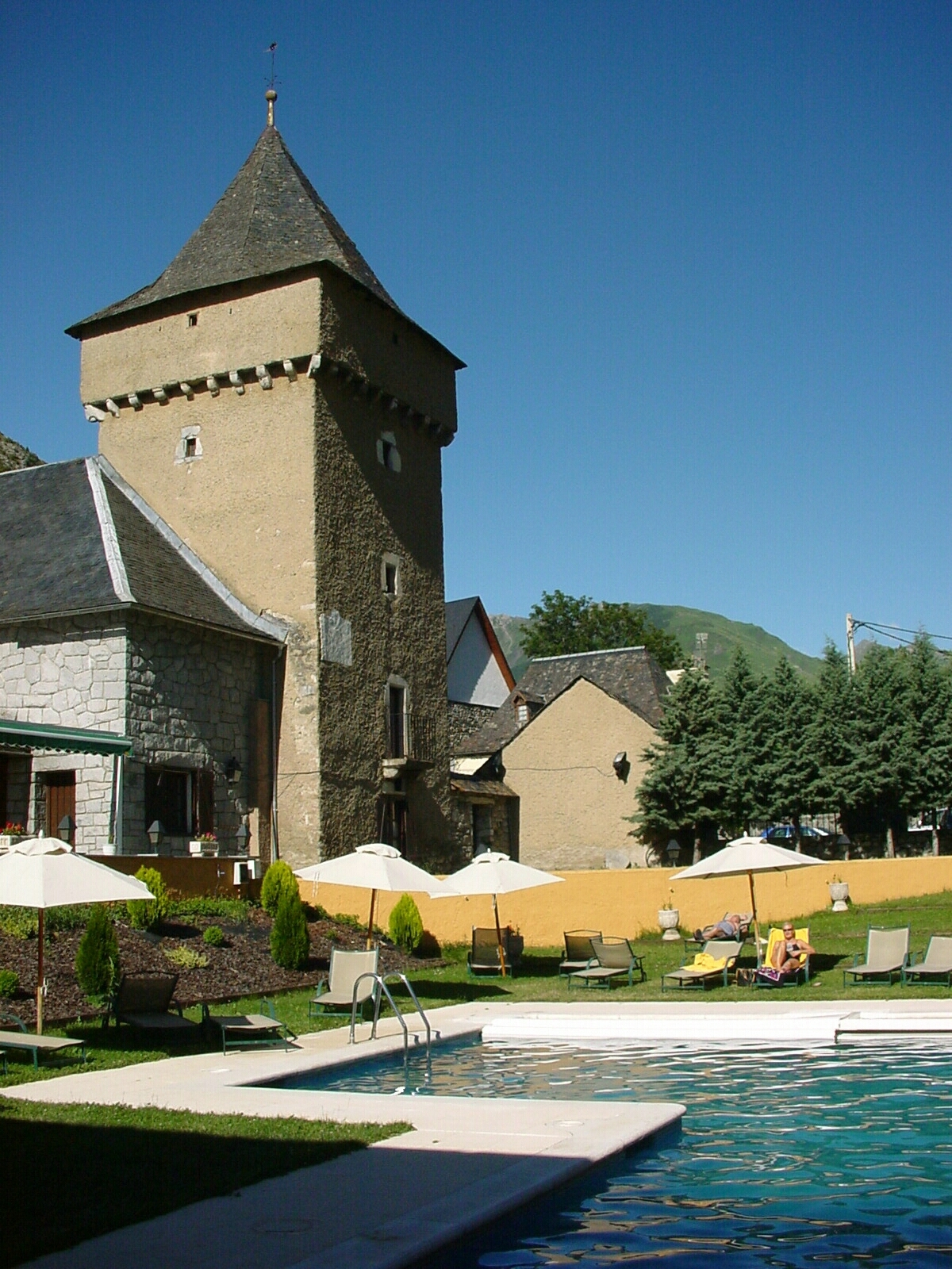 ParadorDeArties